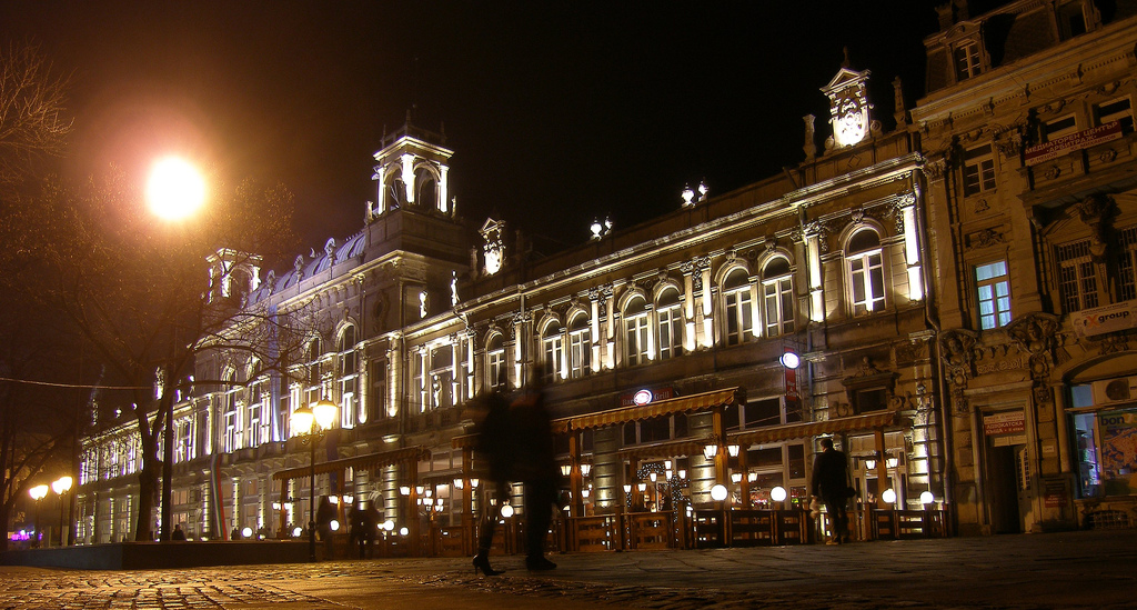 Dohodno Zdanie, Rousse, Bulgaria